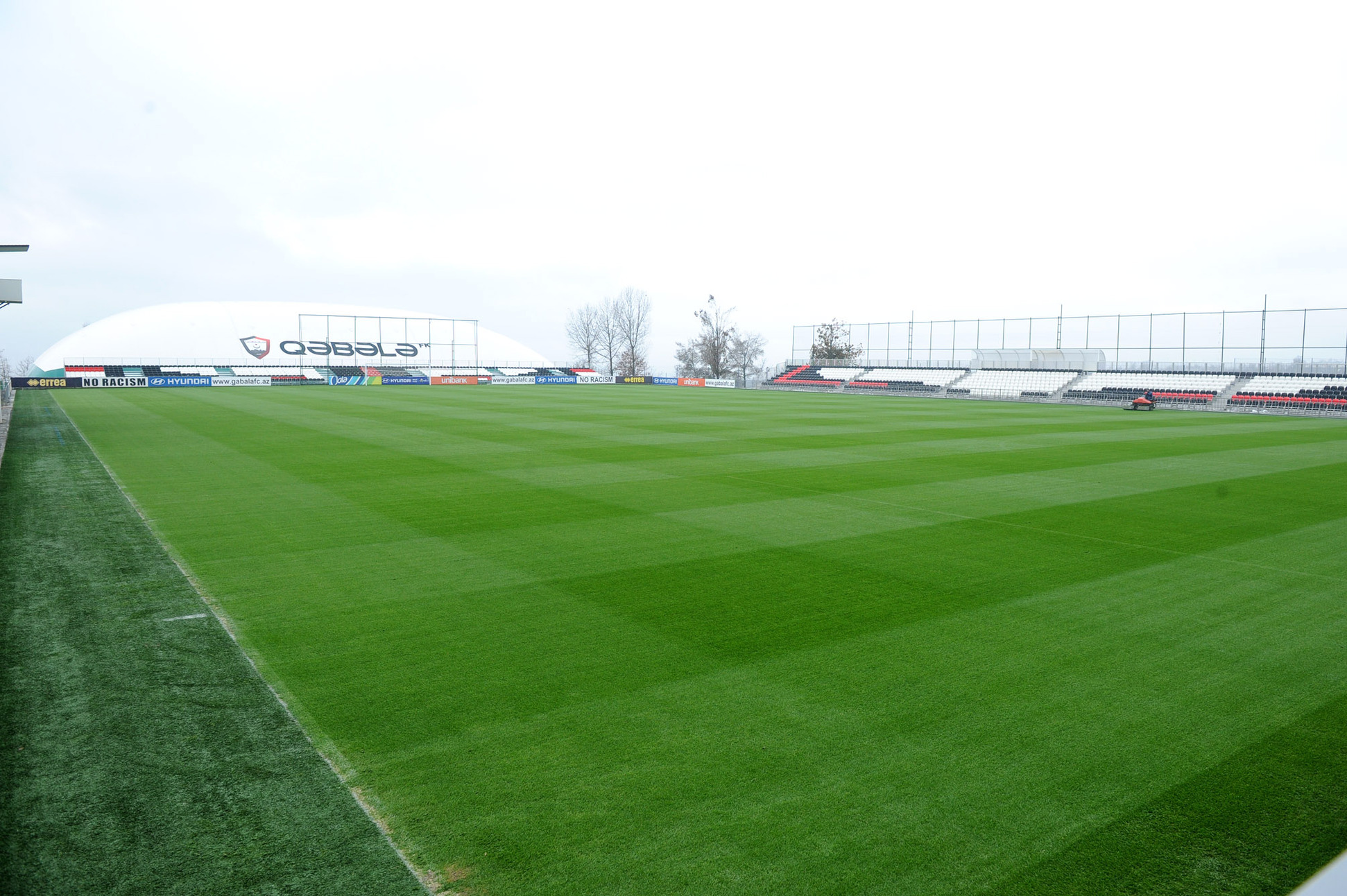 İlham Əliyev “Qəbələ” Futbol Klubunun stadion və təlim-məşq bazası kompleksində aparılan tikinti işləri ilə tanış olmuşdur